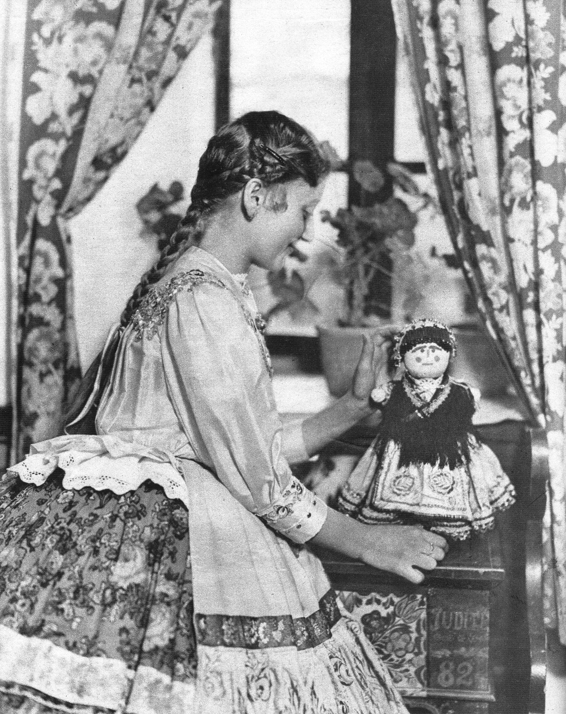 Bubával játszó sárközi kislány